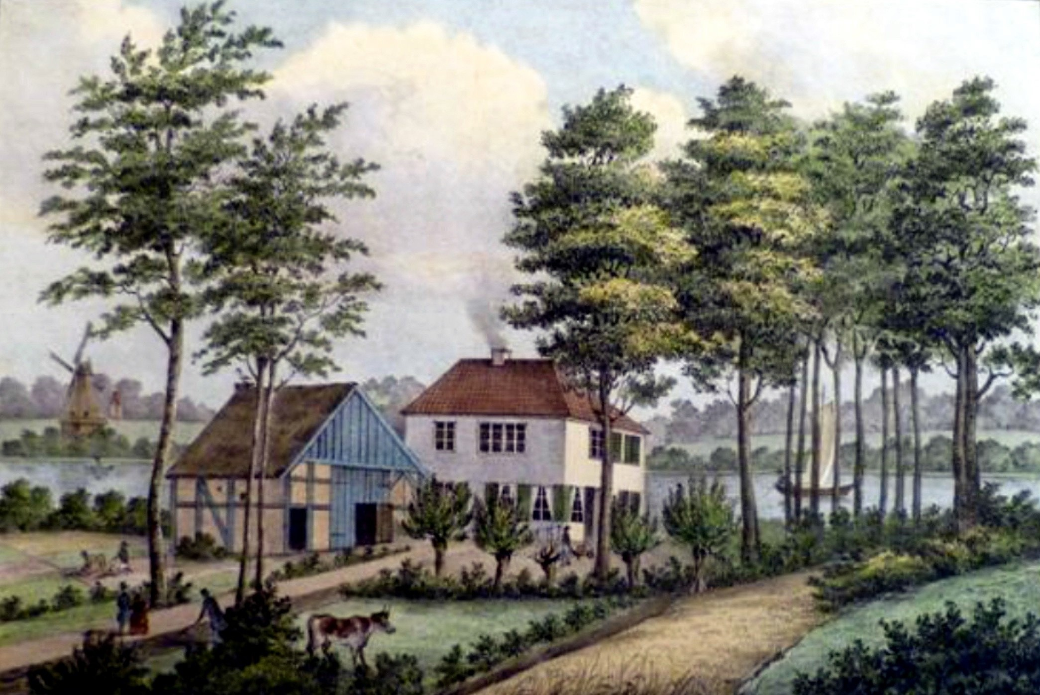 Das Rettungshaus auf dem dritten Fischerbuden in Lübeck; abgebrannt 1901